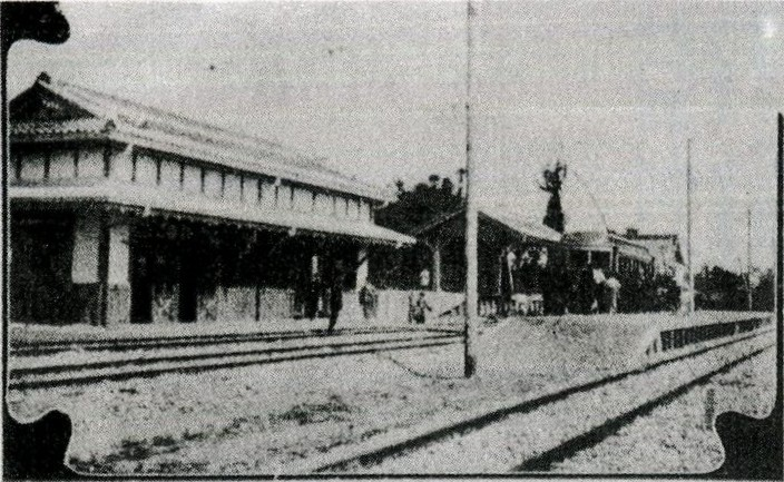 開業直後の布袋駅。電車の左に貨物ホームがある。この駅舎は2010年から解体された。「写真集 江南 明治・大正・昭和」(1987年、創文出版社)P9に掲載された。